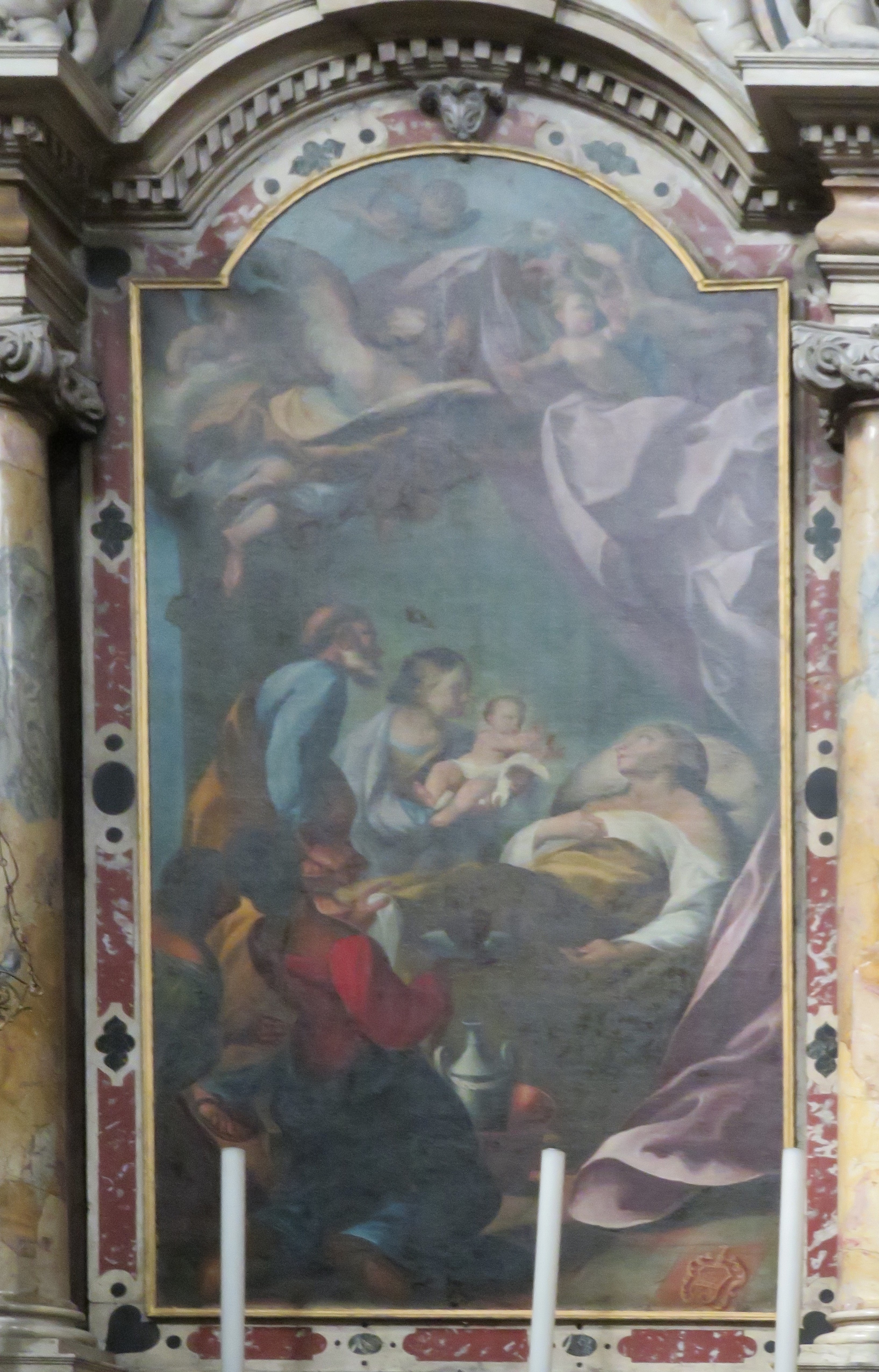 Chiesa di Loreto - Pala di S.Anna